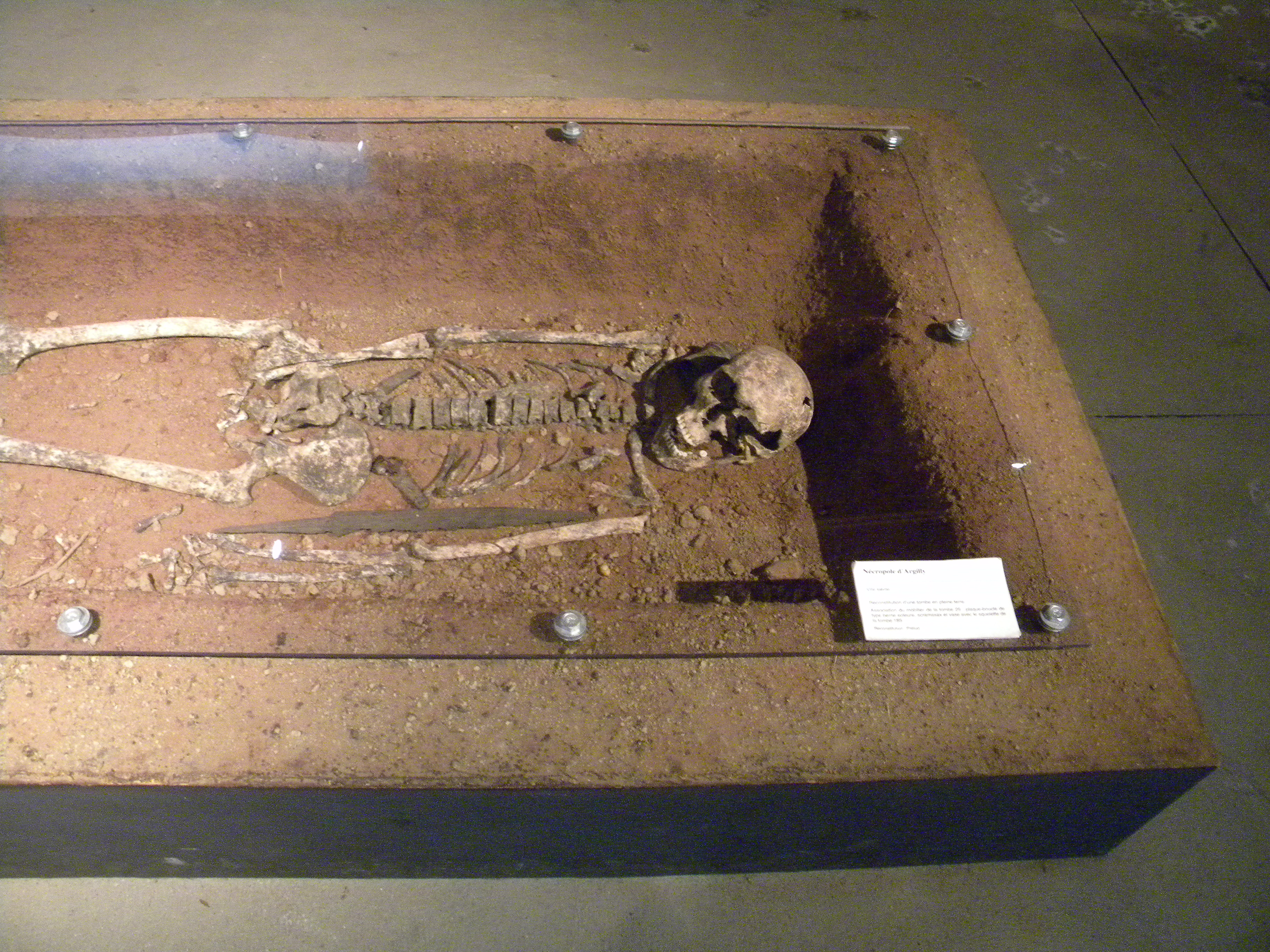 Argilly tombe mérovingienne